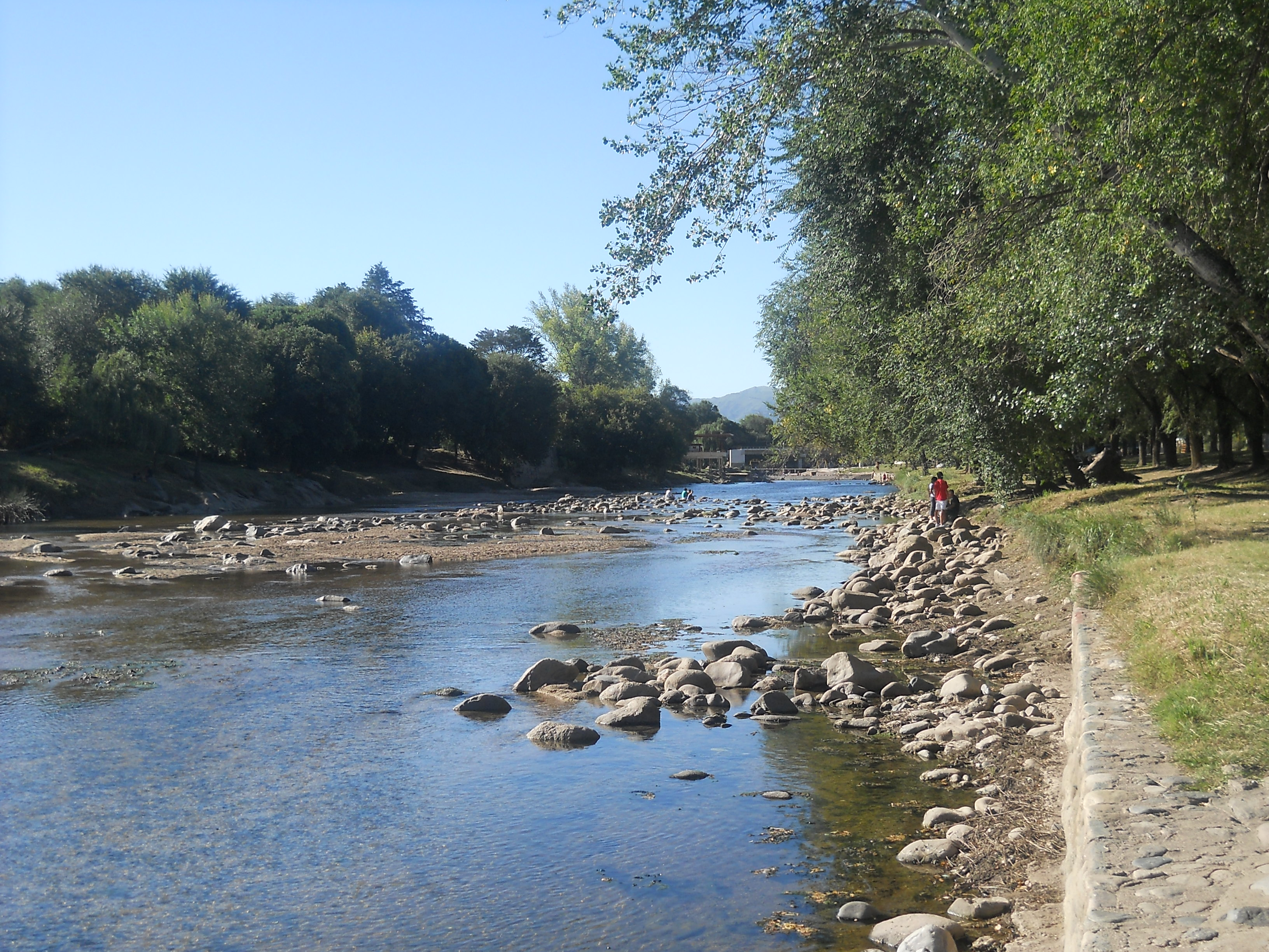 Finalizada la época estival, el caudal del río, se reduce notablemente.